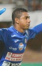 Jose fernando cuadrado